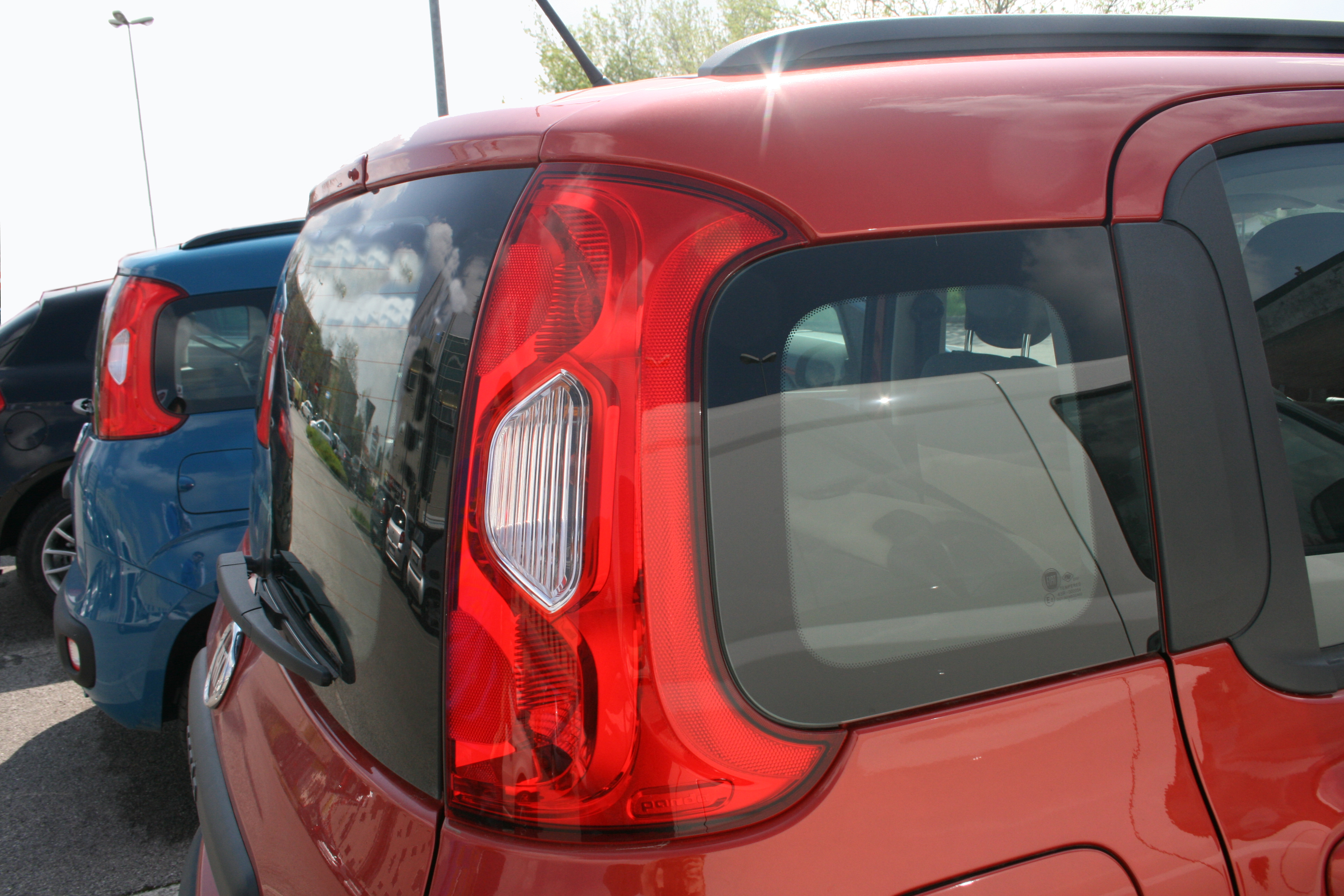 bagagliaio e faro posteriore panda